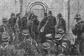 Photo ainsi légendée : "A Saint-Pol-de-Léon, la troupe tente d'enfoncer la porte de la cathédrale" (lors de la querelle des inventaires)